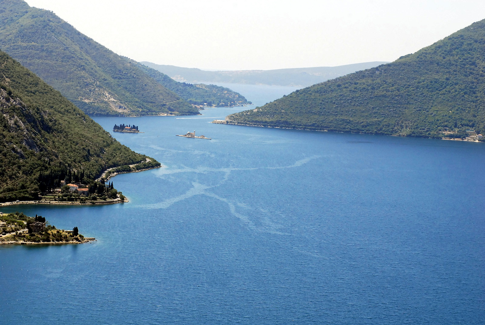 Widok na Zatoke Kotorska od pasma Ledenice.